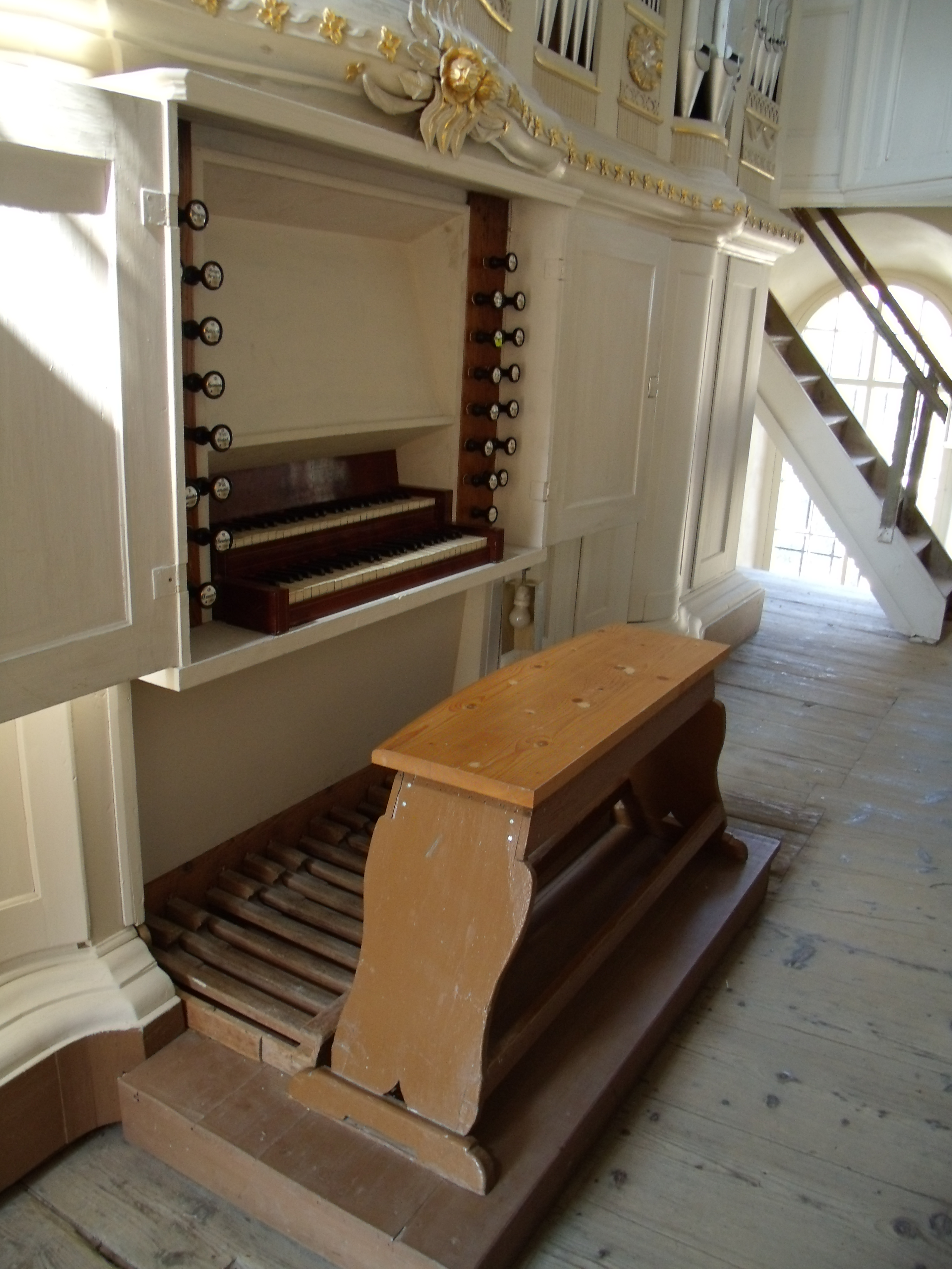 Kirche Bechstedtstraß, Thüringen: Spieltisch und Bank der Witzmannorgel